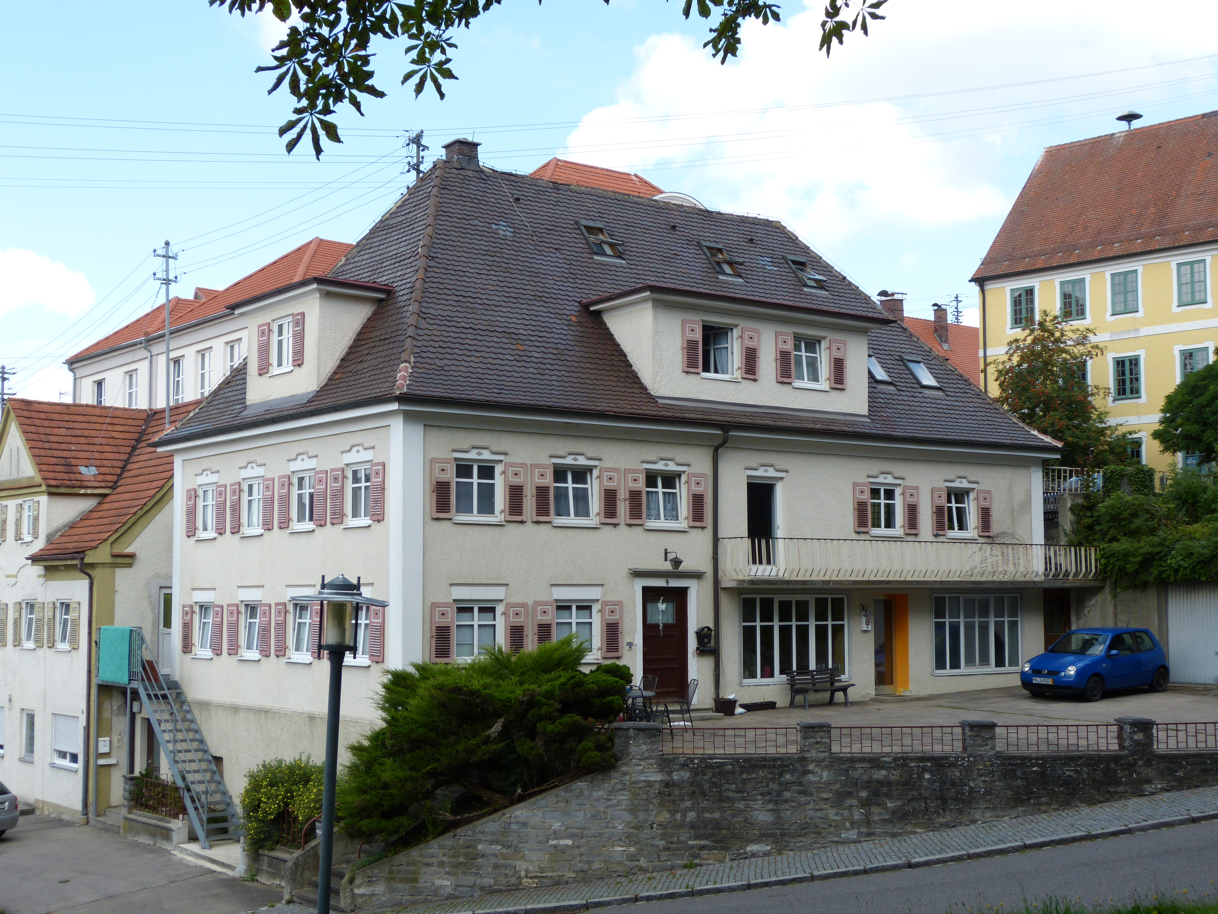 Bahnhofstraße 4, Kirchheim in Schwaben, Landkreis Unterallgäu, Bayern